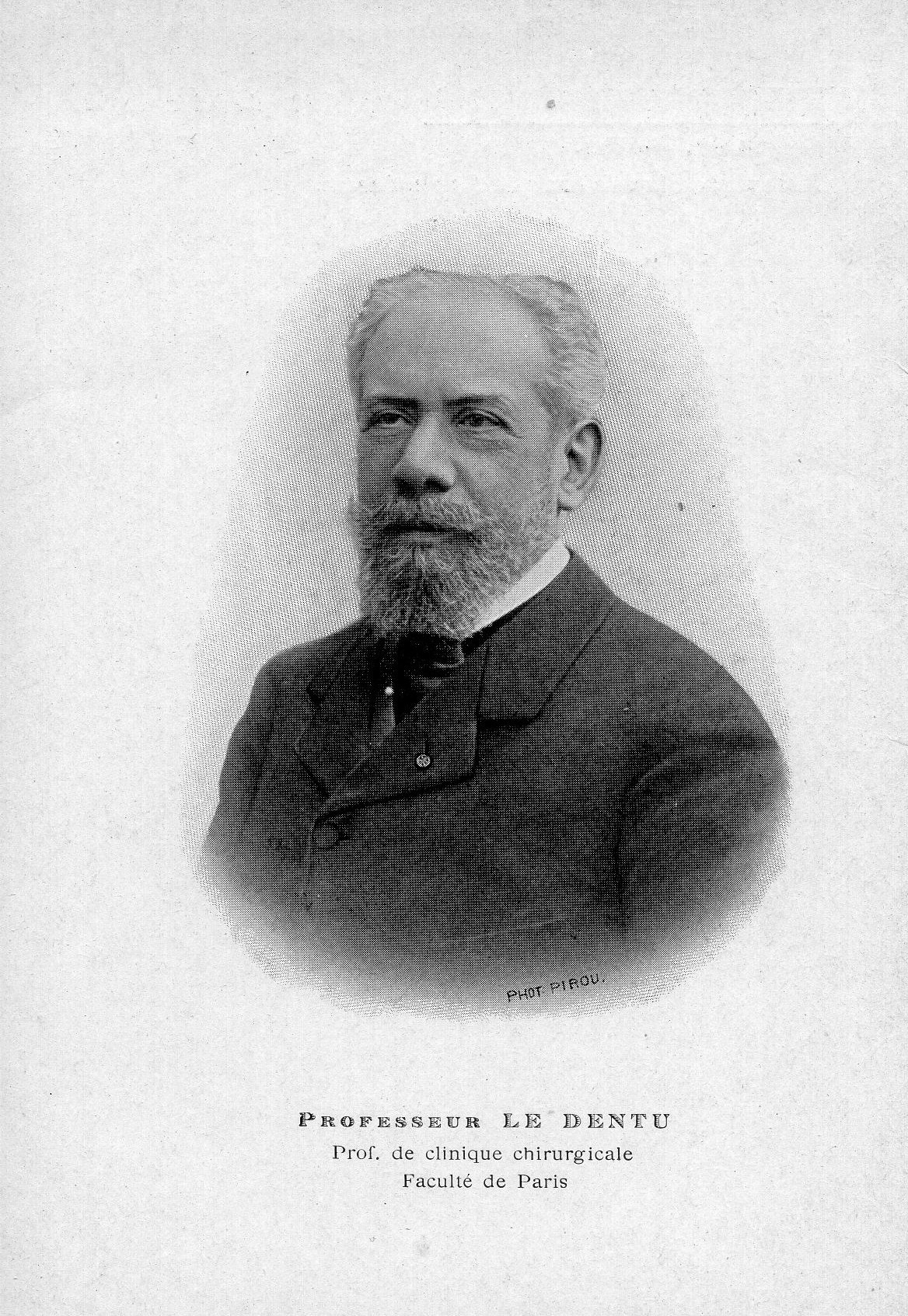 Foto di Jean-François-Auguste Le Dentu (1841-1926), docente di Clinica Chirurgica presso la facoltà di Medicina di Parigi.